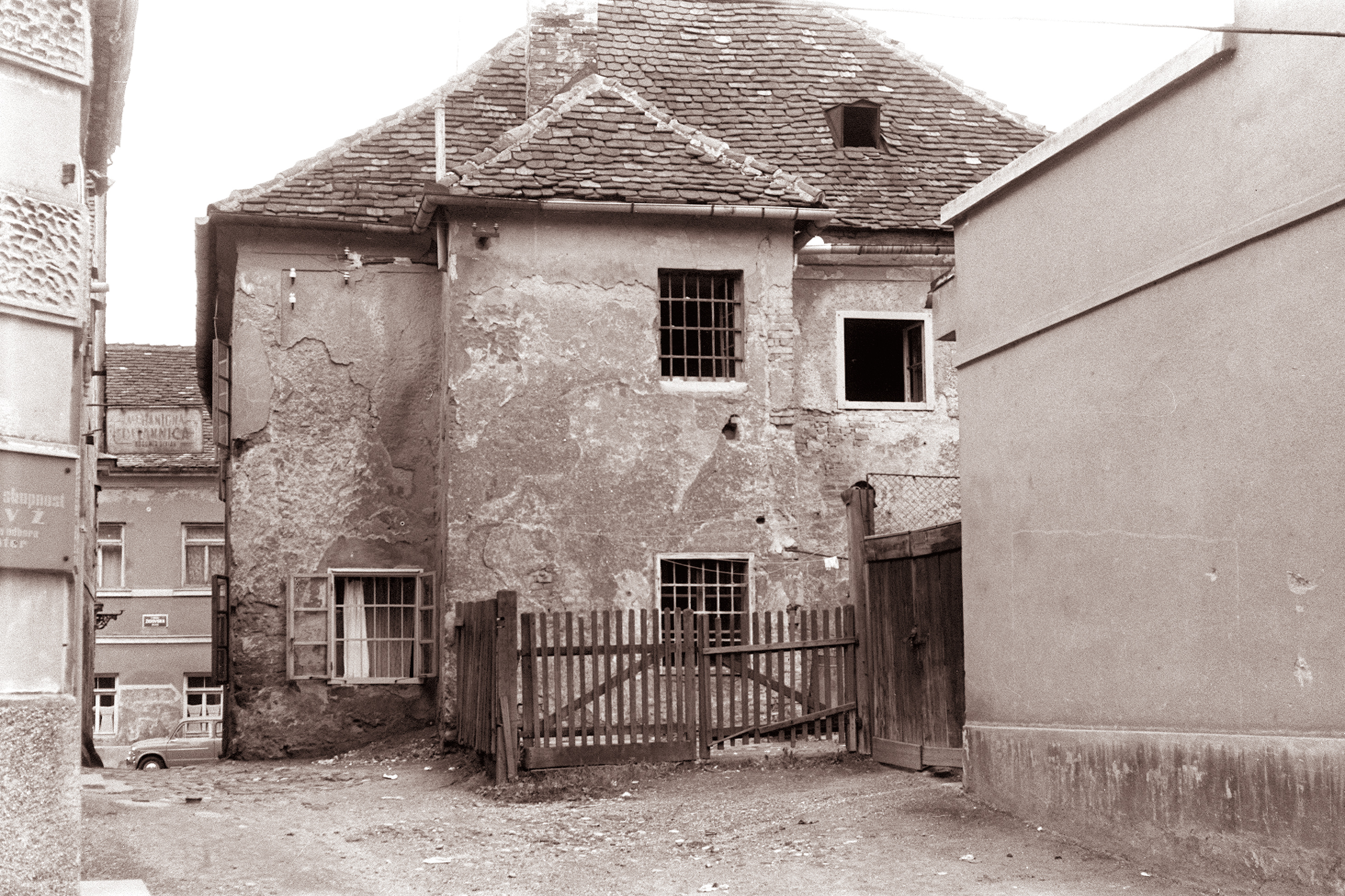 Ključavničarska ulica v Mariboru